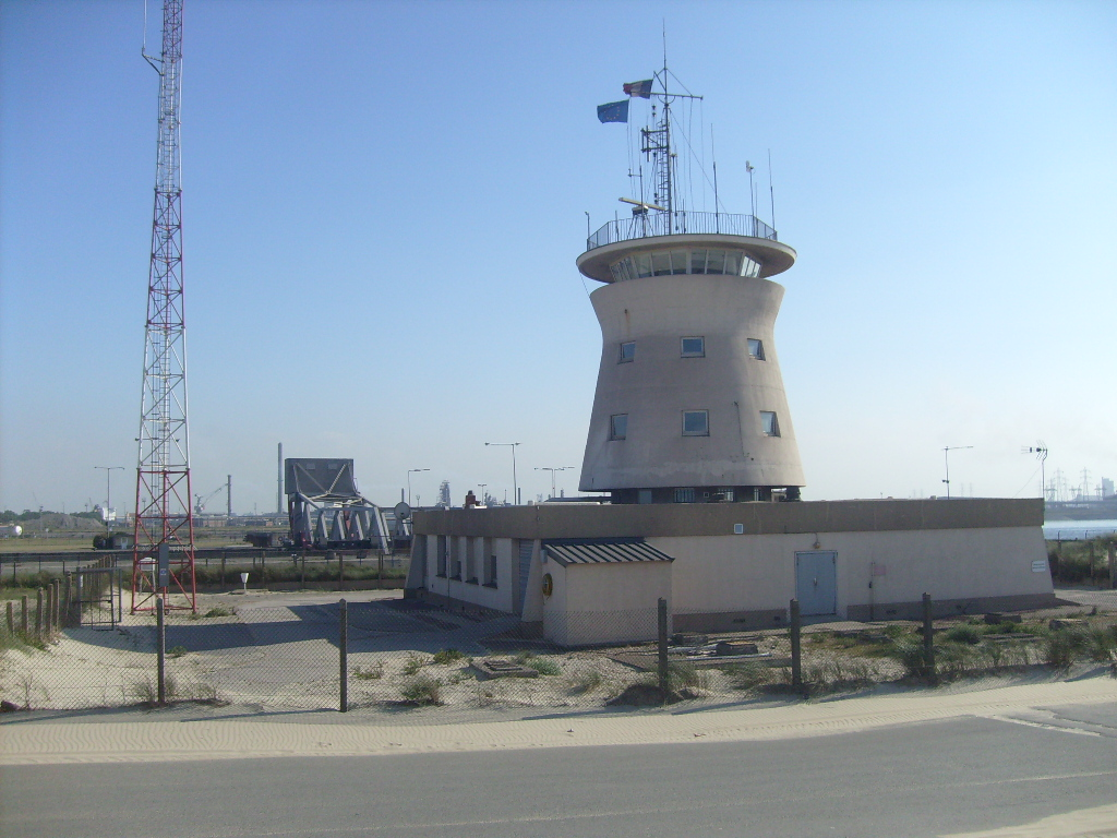 Station météo de Dunkerque